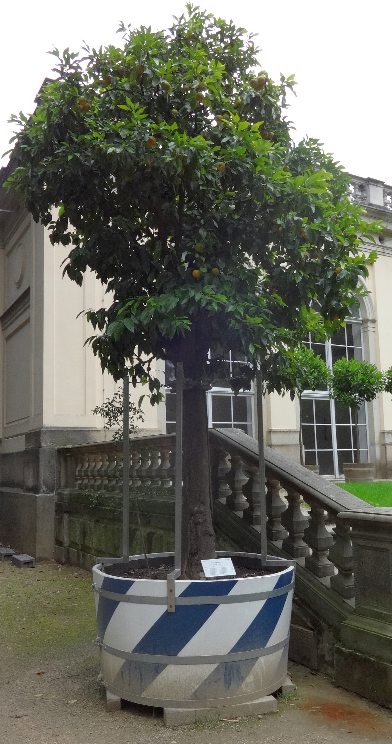 Bitterorange, Pomeranze im Schlosspark Pillnitz; etwa 300 Jahre alt und damit älteste Pflanze ihrer Art im deutschsprachigen Raum. Älteste Pflanze im Pillnitzer Schlosspark.